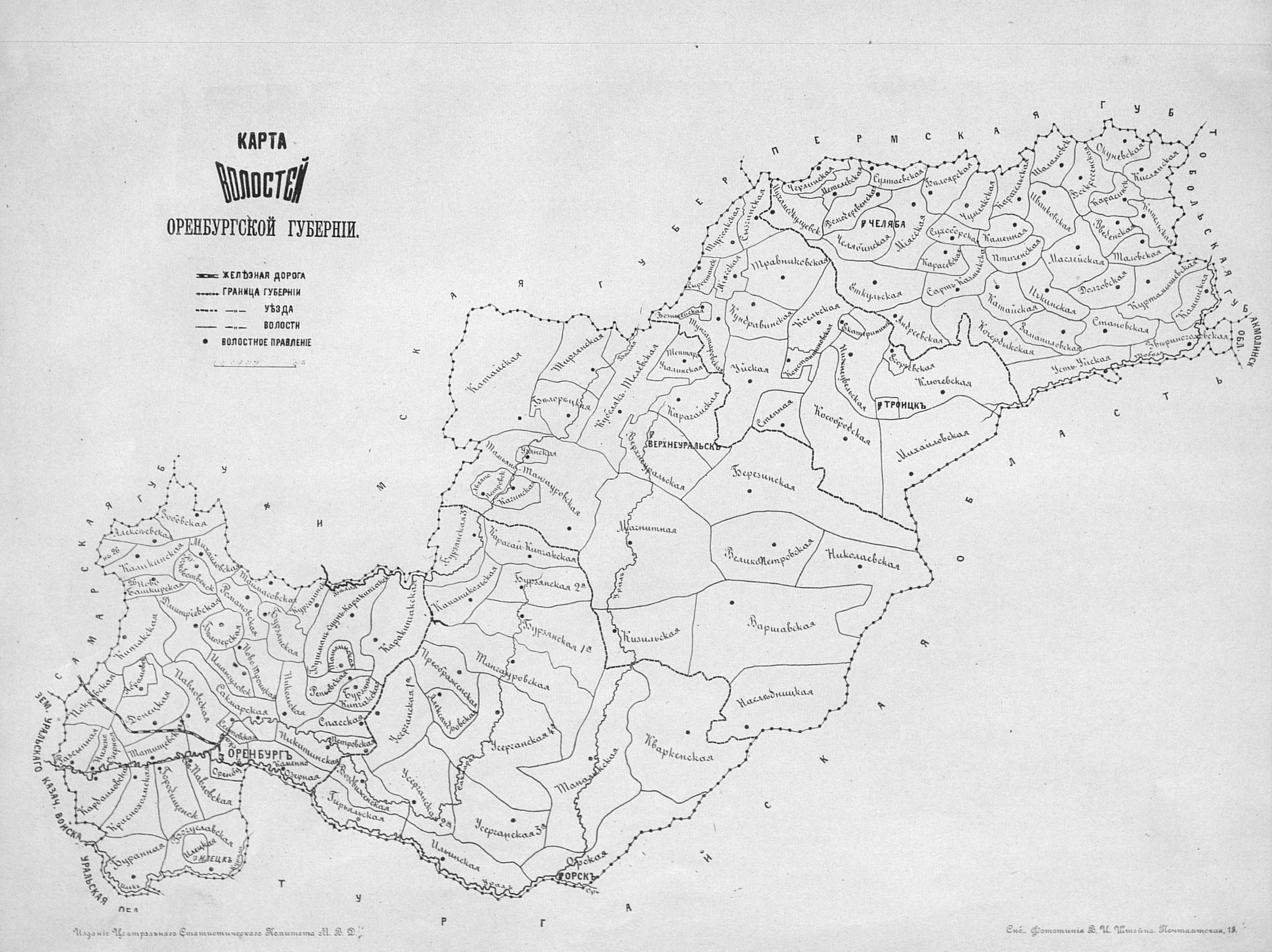 Карта волостей Оренбургской губернии